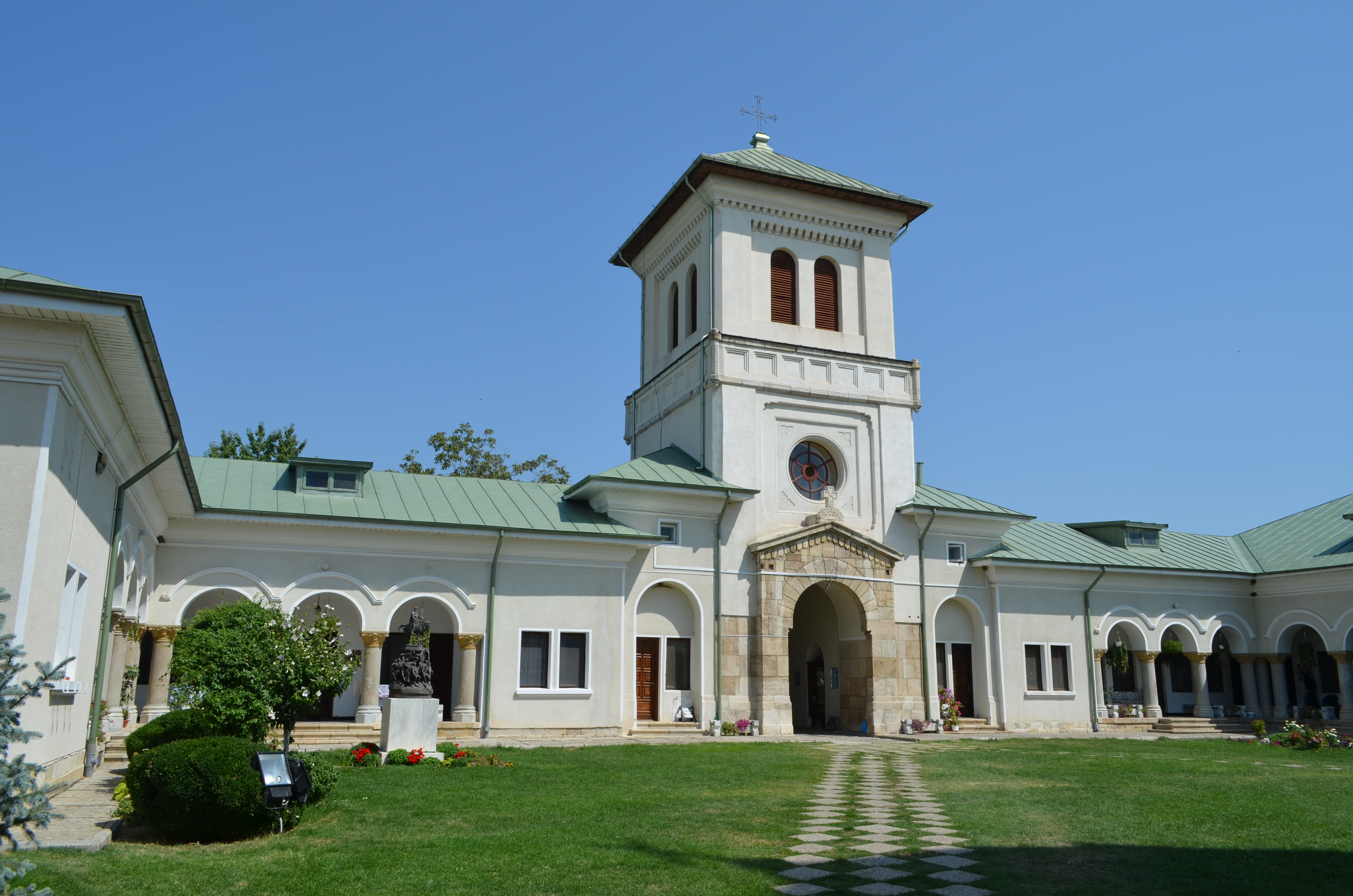 Turnul clopotniță și poarta Mănăstirii Dealu, lângă Târgoviște 03